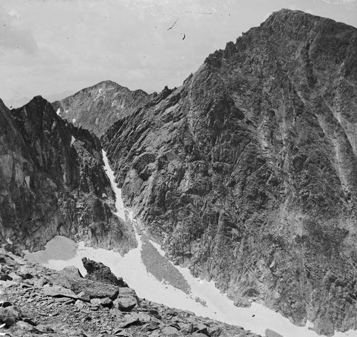 Imatge